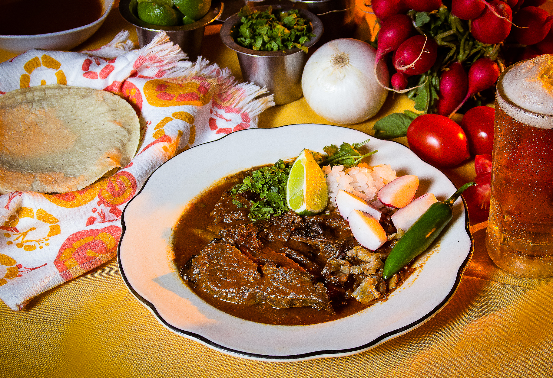 Comida típica de la región